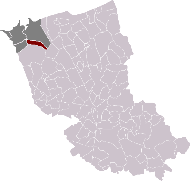 Locatie gemeente Kraaiwijk in arrondissement Duinkerke. Zelfgemaakt. Location of Craywick municipality in the arrondissement of Dunkirk. Self made. Localisation de la commune de Craywick dans l'arrondissement de Dunkerque. Fait moi-même.